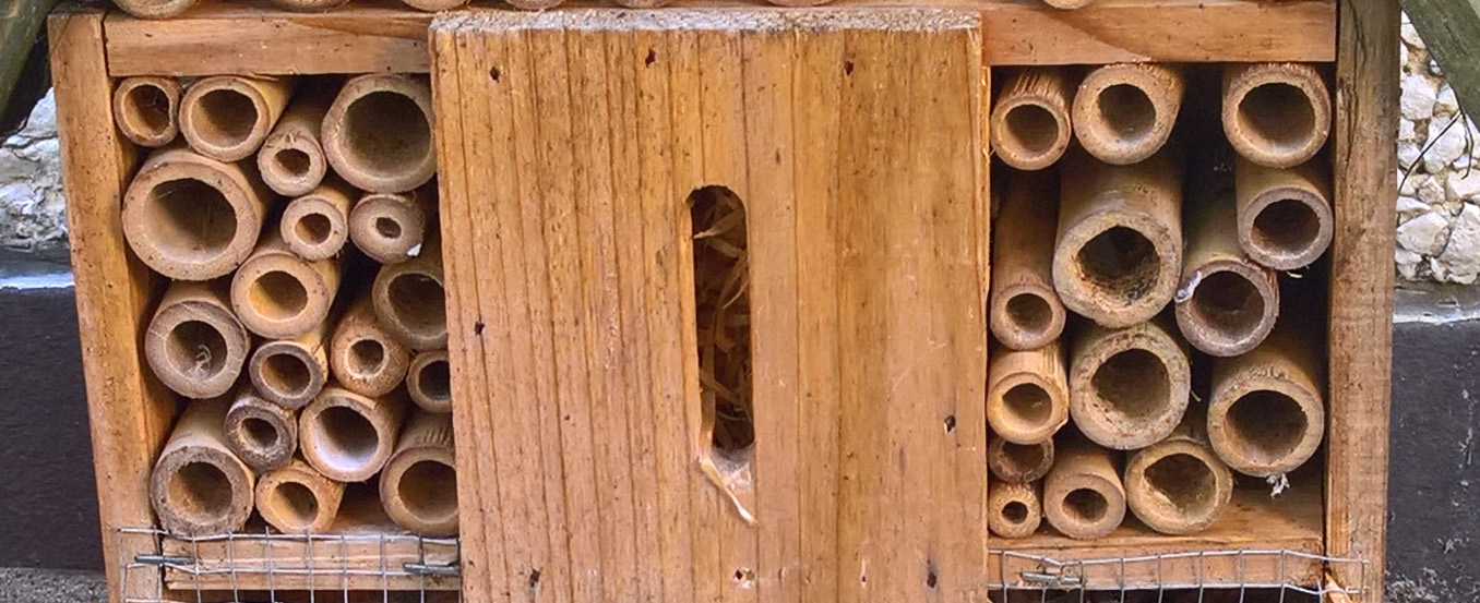 unnützes "Schmetterlingsübwerwinterungsqautier". nach einem Jahr lösten sich die Rohrchen rot unnützes "Schmetterlingsübwerwinterungsqautier". rot unnützes "Schmetterlingsübwerwinterungsqautier". rot unnützes "Schmetterlingsübwerwinterungsqautier".